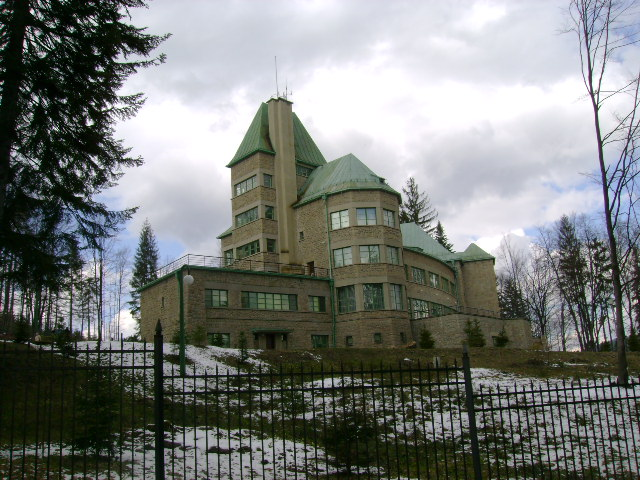 Zameczek_Prezydencki w Wiśle od strony ulicy